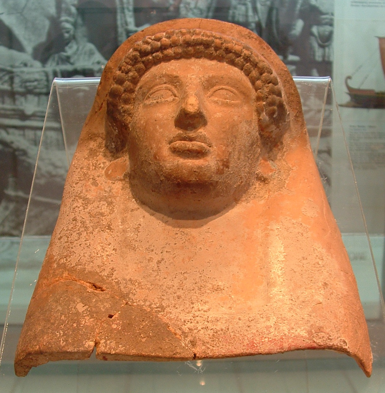 Terracotta figurines in Ancient time - Israeli National Maritime Museum. Haifa צלמיות בעת העתיקה, מאוסף המוזיאון הלאומי הימי בחיפה צלמית היא פסלון קטן ממדים בצלם אדם או בעל חיים. הצלמית יוצרה מחומרים שונים בעיקר טין, אבן ומתכת. על פי הצלמית ניתן ללמוד על מנהגי פולחן , אורחות חיים ומנהגים של התרבויות השונות לאורך ההיסטוריה. מקום הימצאן הפיזי כפי שהן נמצאות בעת חפירה ארכאולוגית מאפשר הסקת מסקנות לגבי השימושים של הצלמיות כגון, חפצי קדושה, קמע פוריות, קמע מזל ועוד. הצלמיות הקדומות ביותר במזרח הקרוב הופיעו בתקופה הניאוליתית קדם-קראמית (מחצית האלף ה-9 לפנה"ס – ועד סוף האלף ה-6 לפנה"ס) צלמית מסכה מחרס בדמות אשה. התקופה הקלאסית מאה חמישית לפני הספירה, רודוס יוון This image was taken as part of the Wikipedia Loves Art project and is uploaded curtesy of the National Maritime Museum in Haifa. In any use of this image credit need be given to the Museum as well as the photographer. The copyright holder of this file allows anyone to use it for any purpose, provided that the copyright holder is properly attributed. Redistribution, derivative work, commercial use, and all other use is permitted. This image was taken as part of the Elef Millim project trip and within the Wikipedia Loves Art project to the National Maritime Museum in Haifa in the northern part of Israel, which was held on Friday, 22nd January 2010. To view all images uploaded as pary of the Elef Millim Project